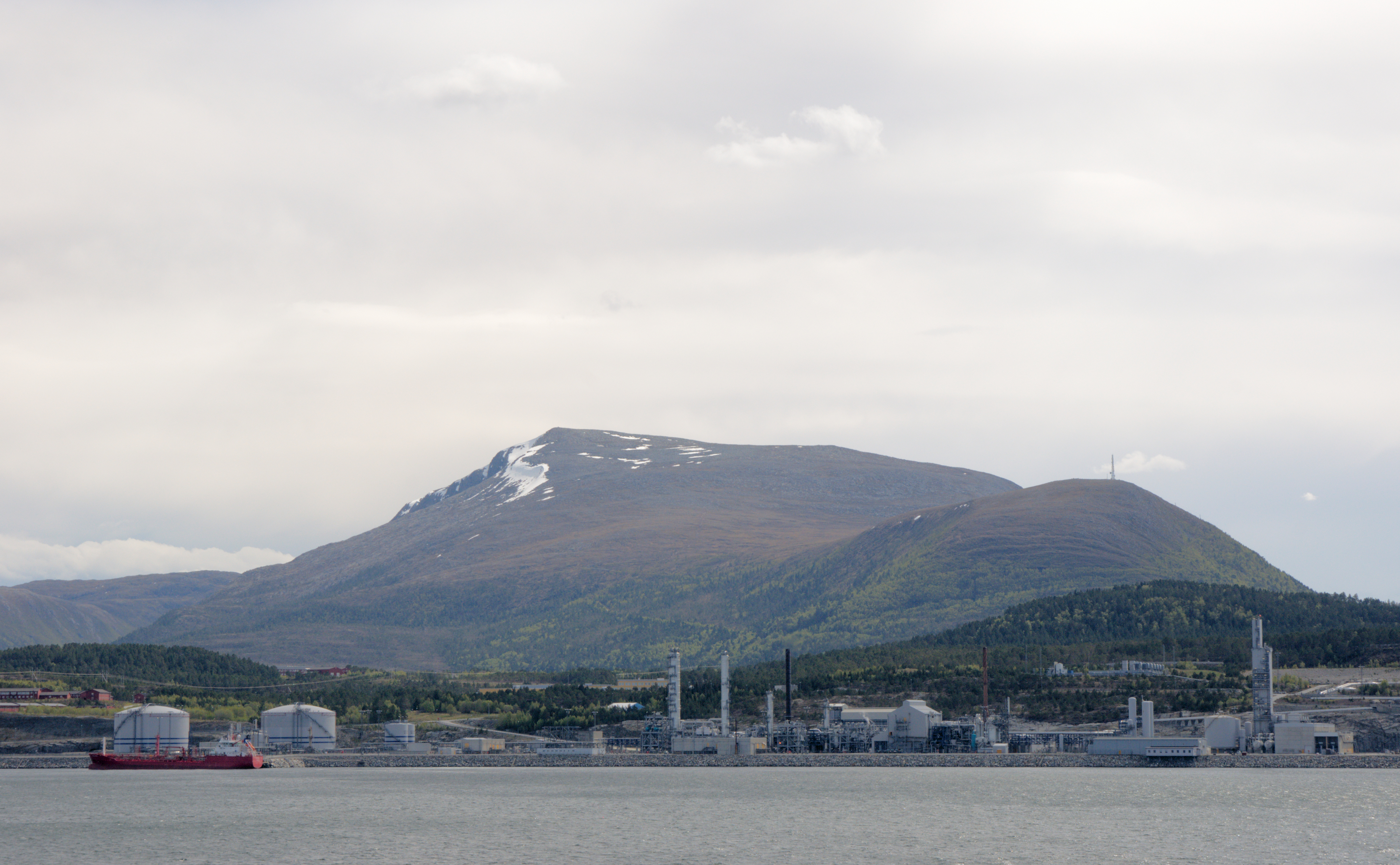 Tjelbergodden